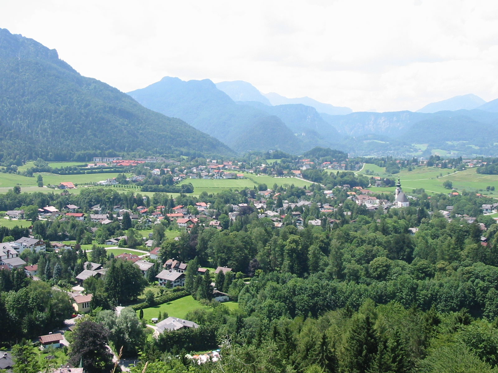 Ein Blick über das Gmainer Tal in Richtung Westen. Fotografiert von der Aussichtsplattform der Plainburg.